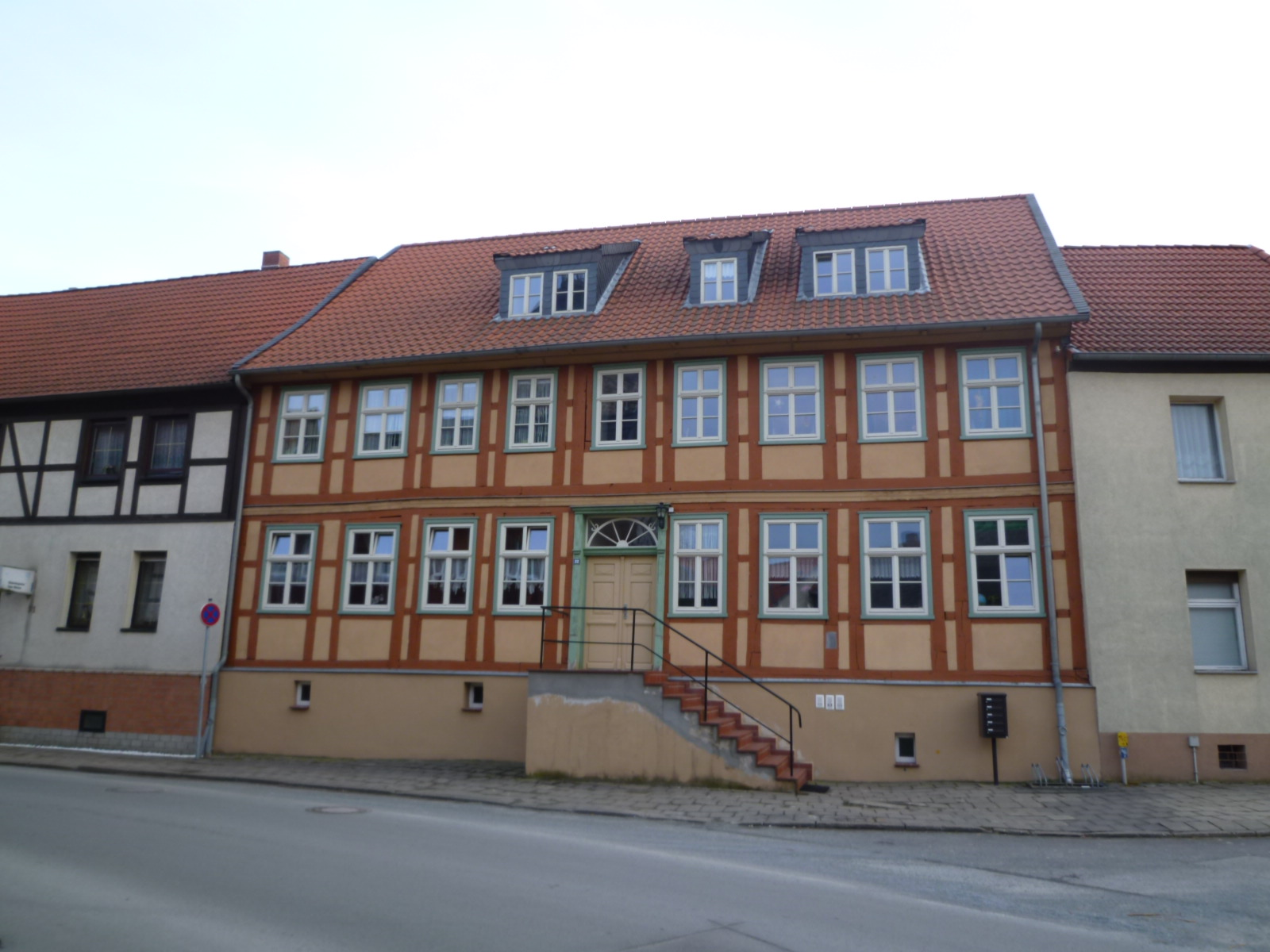 Wohnhaus in Calvörde, Neustadtstraße 32, Vorderansicht